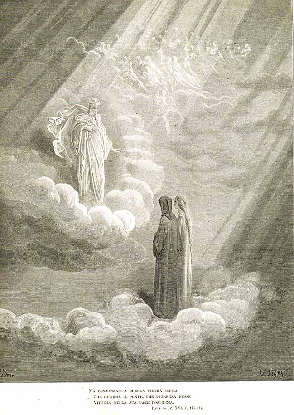 Paradiso by Dante Alighieri Illustration